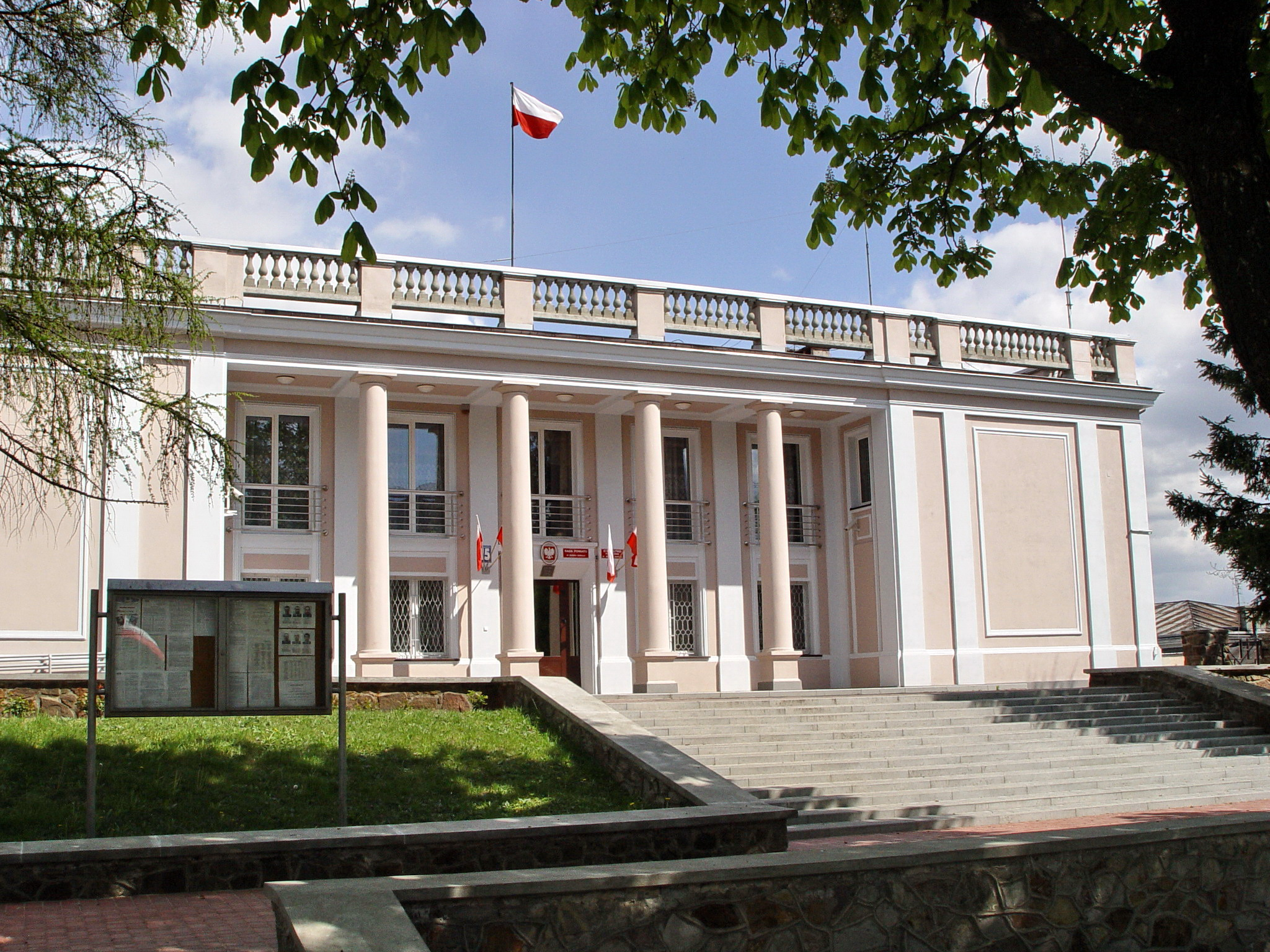 Starostwo Powiatowe w Busku-Zdroju, al.Mickiewicza 15. W latach PRL siedziba Komitetu PZPR. (WikiMapia